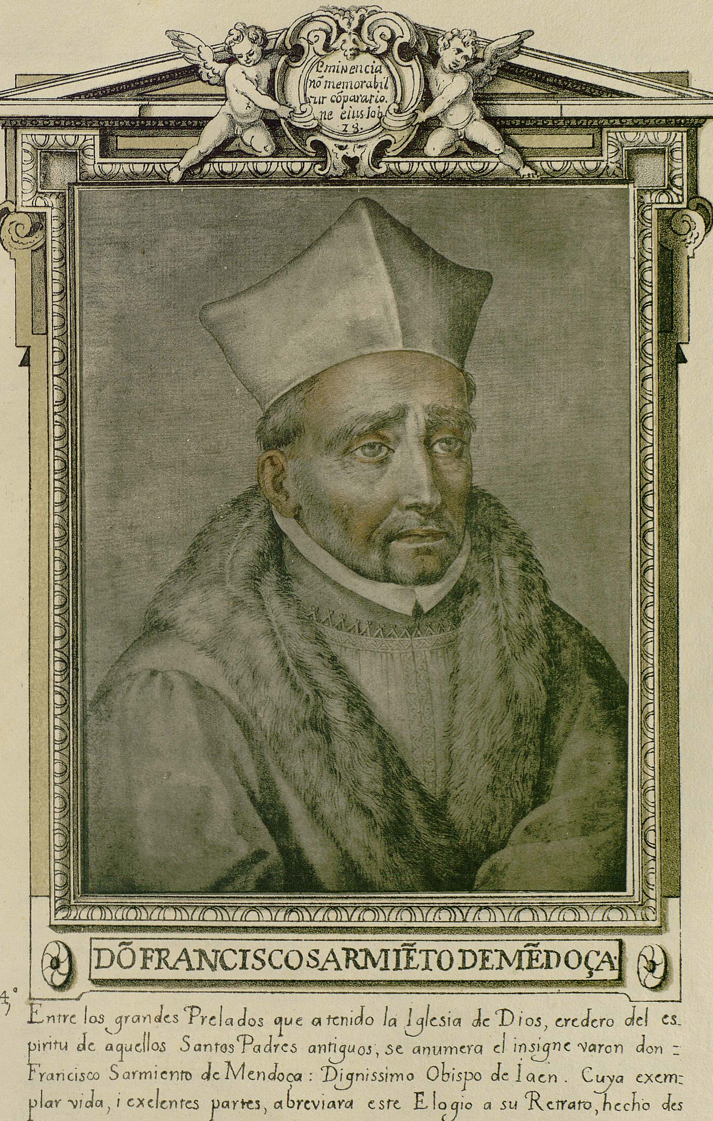 Francisco Sarmiento de Mendoza, Libro de descripción de verdaderos retratos de ilustres y memorables varones, Madrid, Biblioteca de la Fundación Lázaro Galdiano